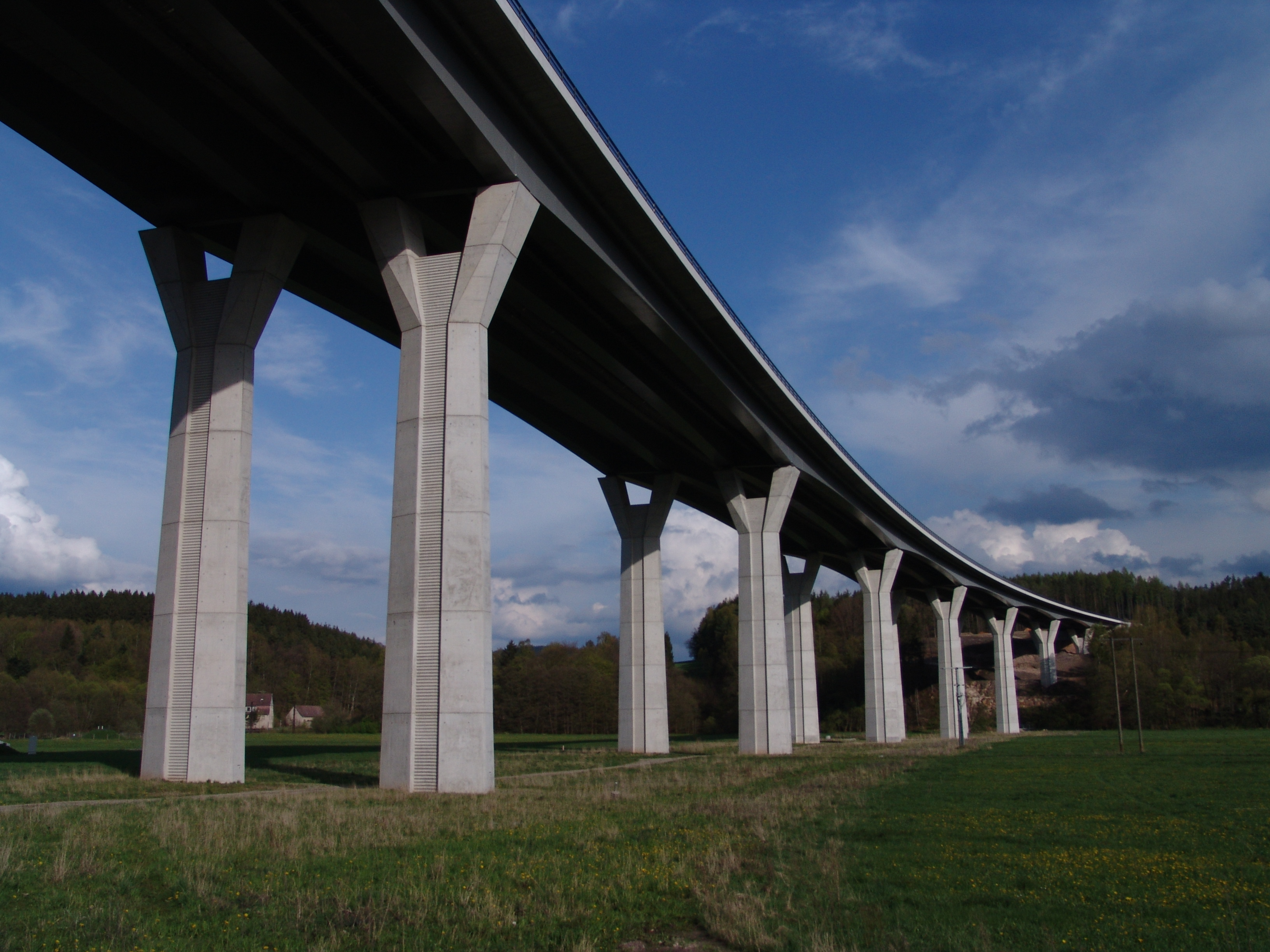 A73-Eisfeld-Schleusingen Talbrücke Schleuse